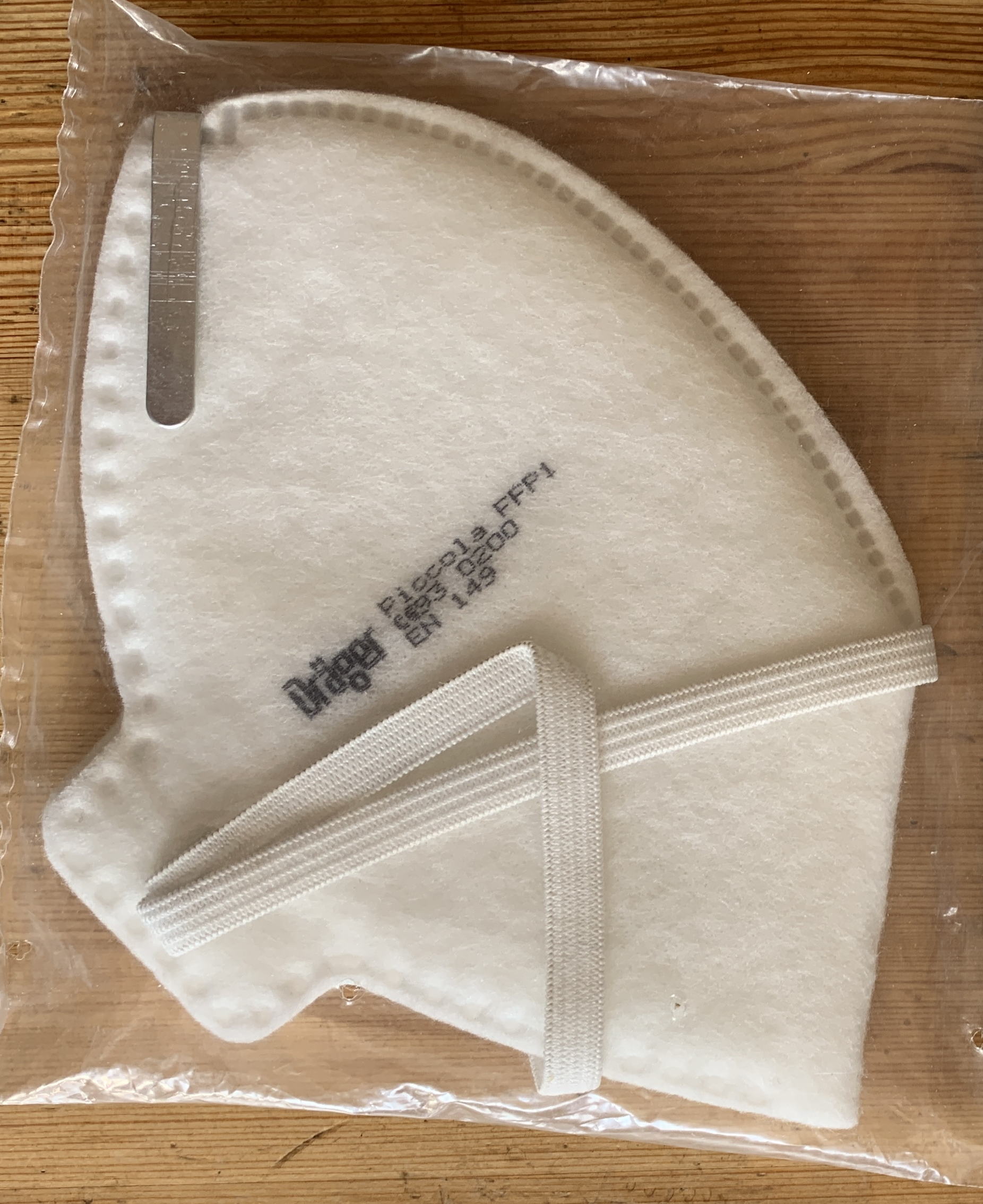 Atemschutzmaske FFP1